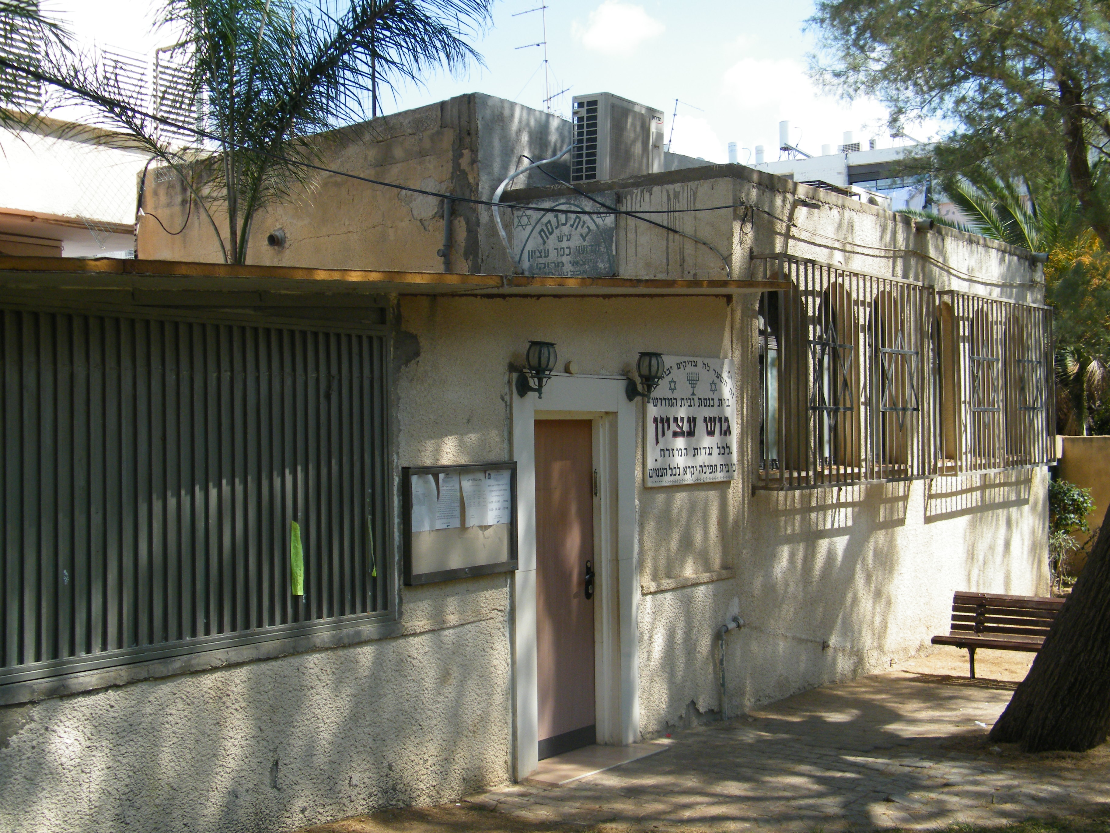 חורשת עצי אשל שניטעה בשכונת עליה ביפו, המקום בו התגוררו המשפחות שפונו מכפר עציון במלחמת העצמאות. התושבים קיימו אורח חיים קיבוצי עד שחזרו בשנות השישים לקיבוץ שהוקם מחדש. בכניסה לחורשה ניטע עץ אלון, סימלו של גוש עציון, ולידו סוכה המנציחה את סוכת הלימוד המפורסמת של הקיבוץ.